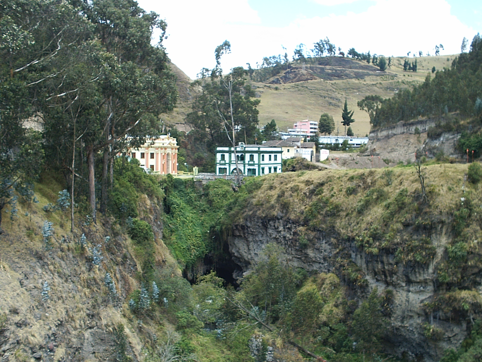 Conjunto Puente Natural Rumichaca y Antigua Casa de Aduana